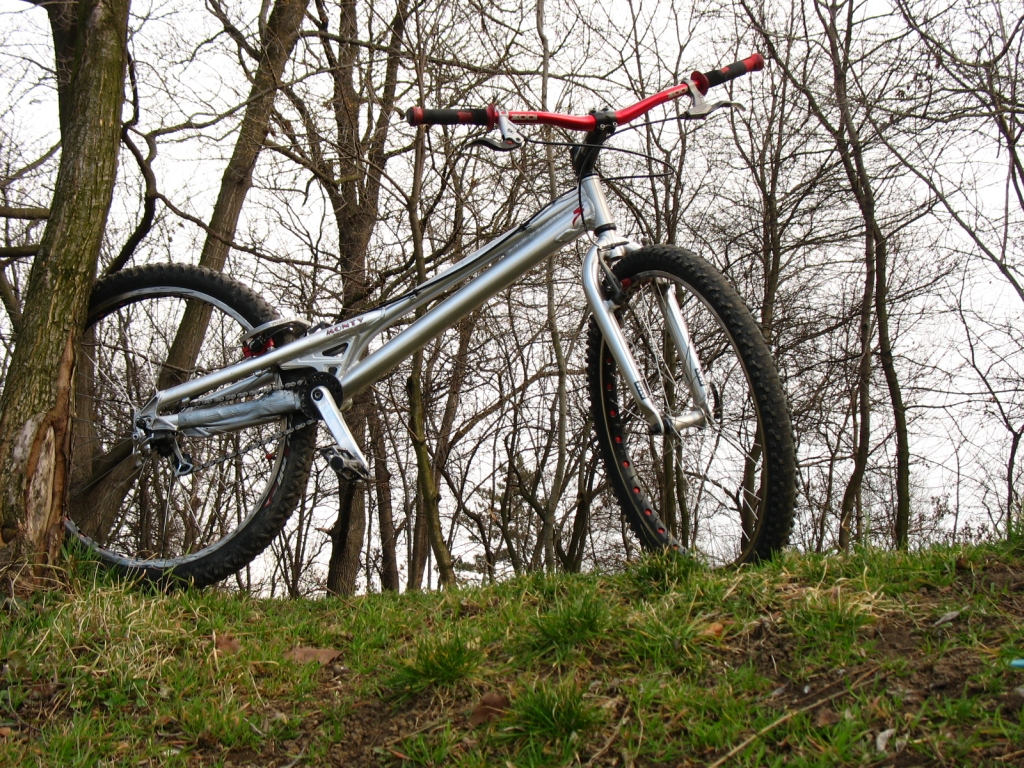 Bicicleta de trial de 26inch.